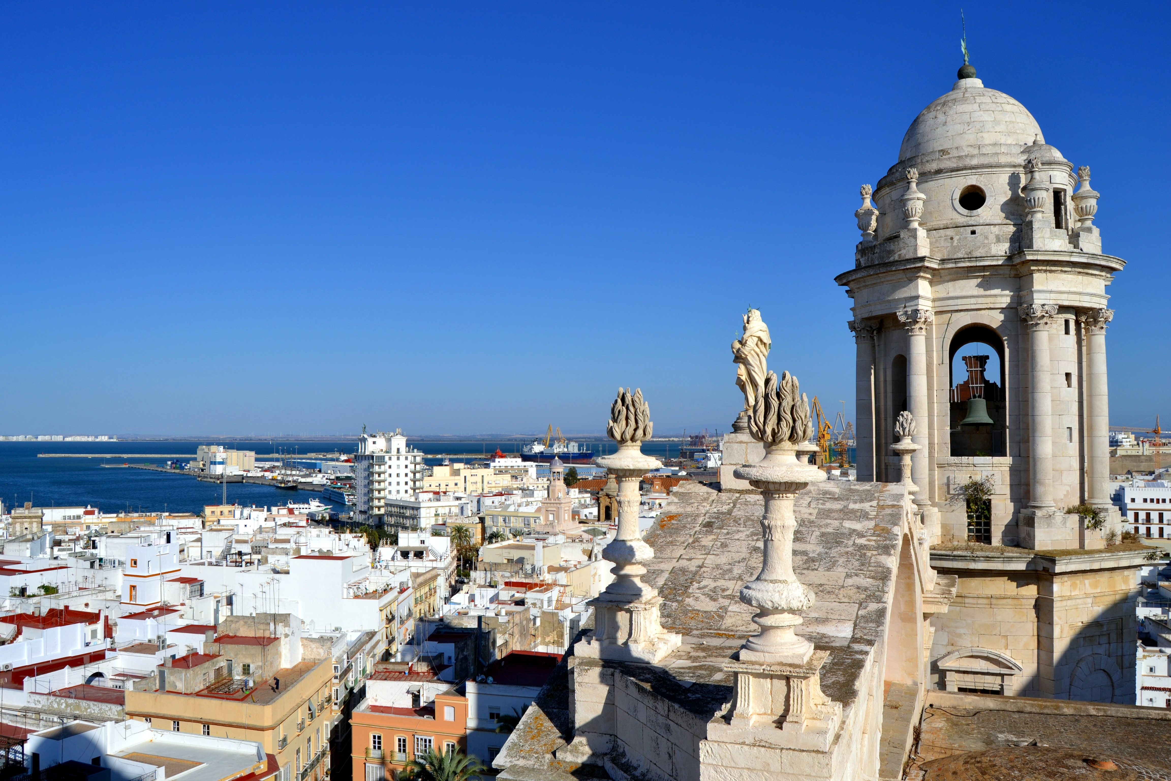 Vistas desde la Torre de Poniente de la Catedral de Cádiz, España.